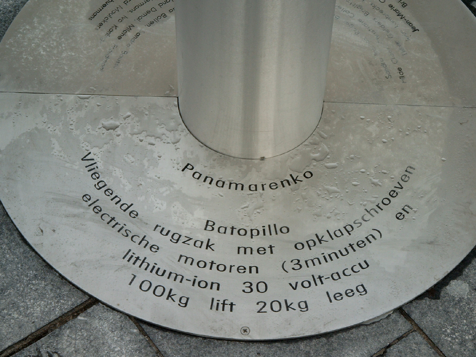 Voet zuil Batopillo, Panamarenko te Hasselt. Eigen werk.